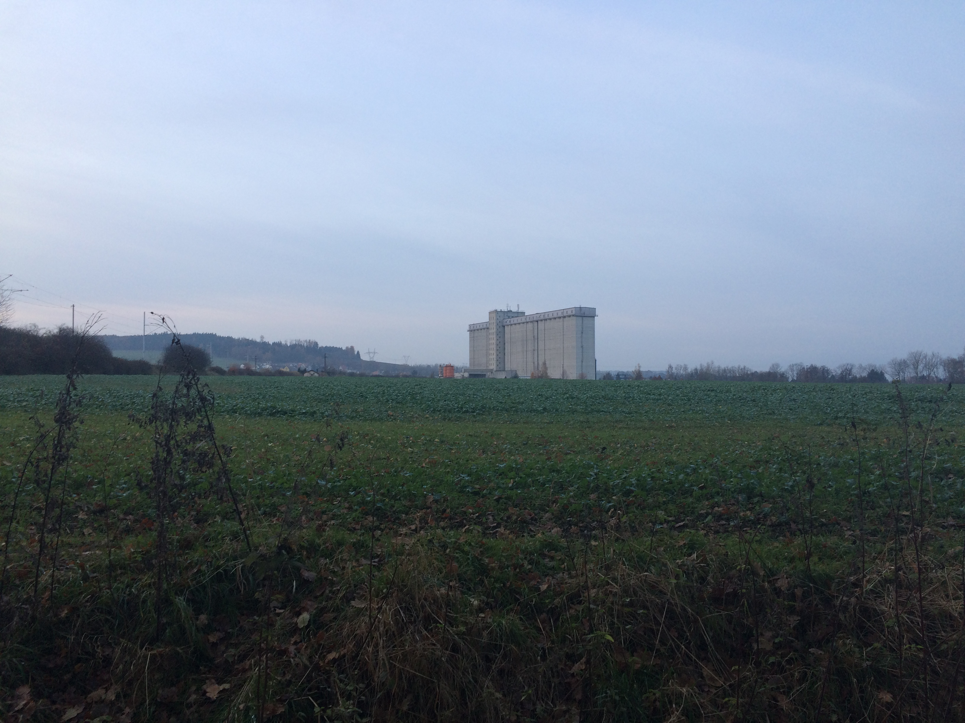 Pohled na blovické silo od Nové Hutě